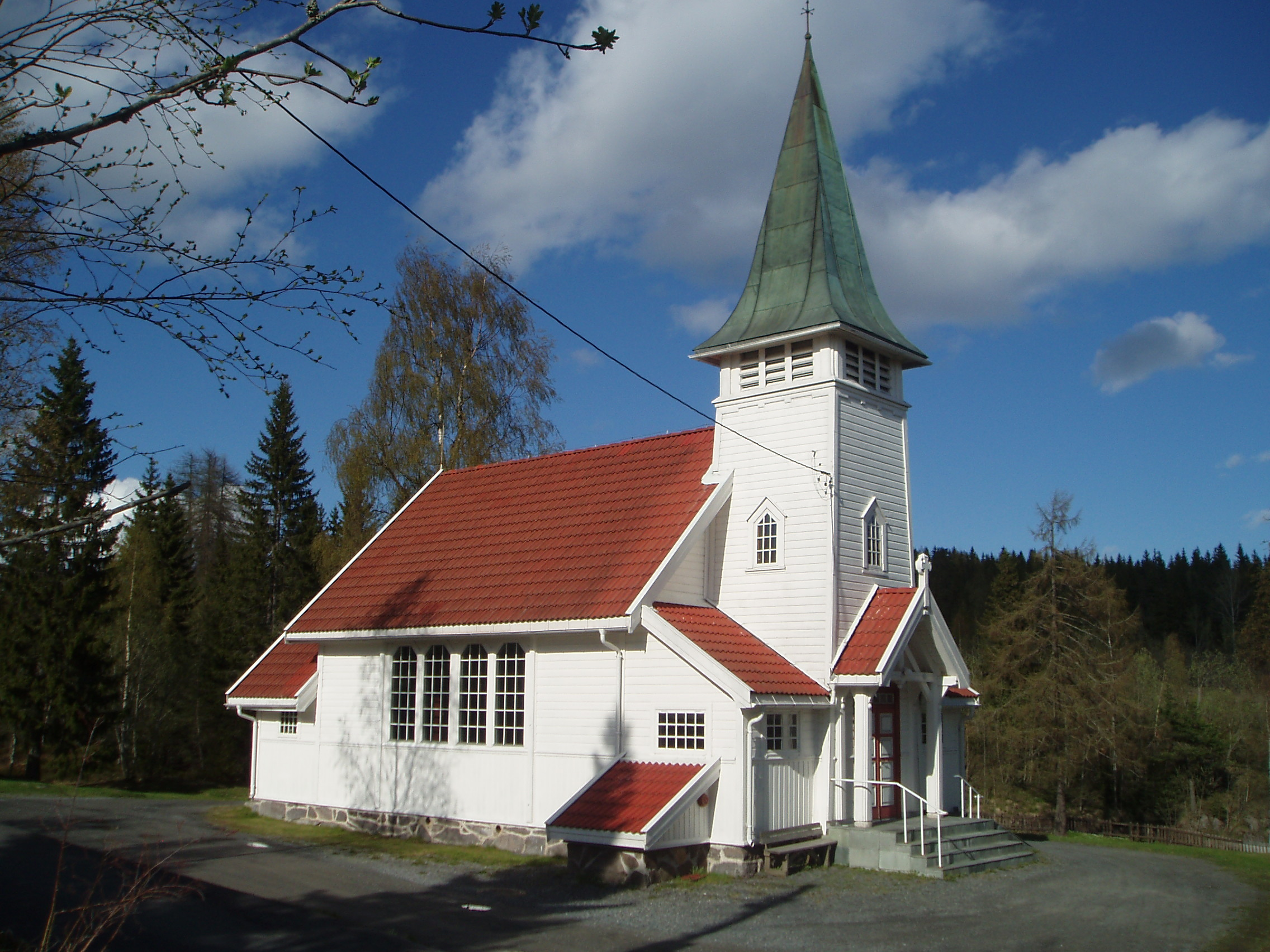 Sollihøgda kapell, Hole kommune, Buskerud fylke, Norge.